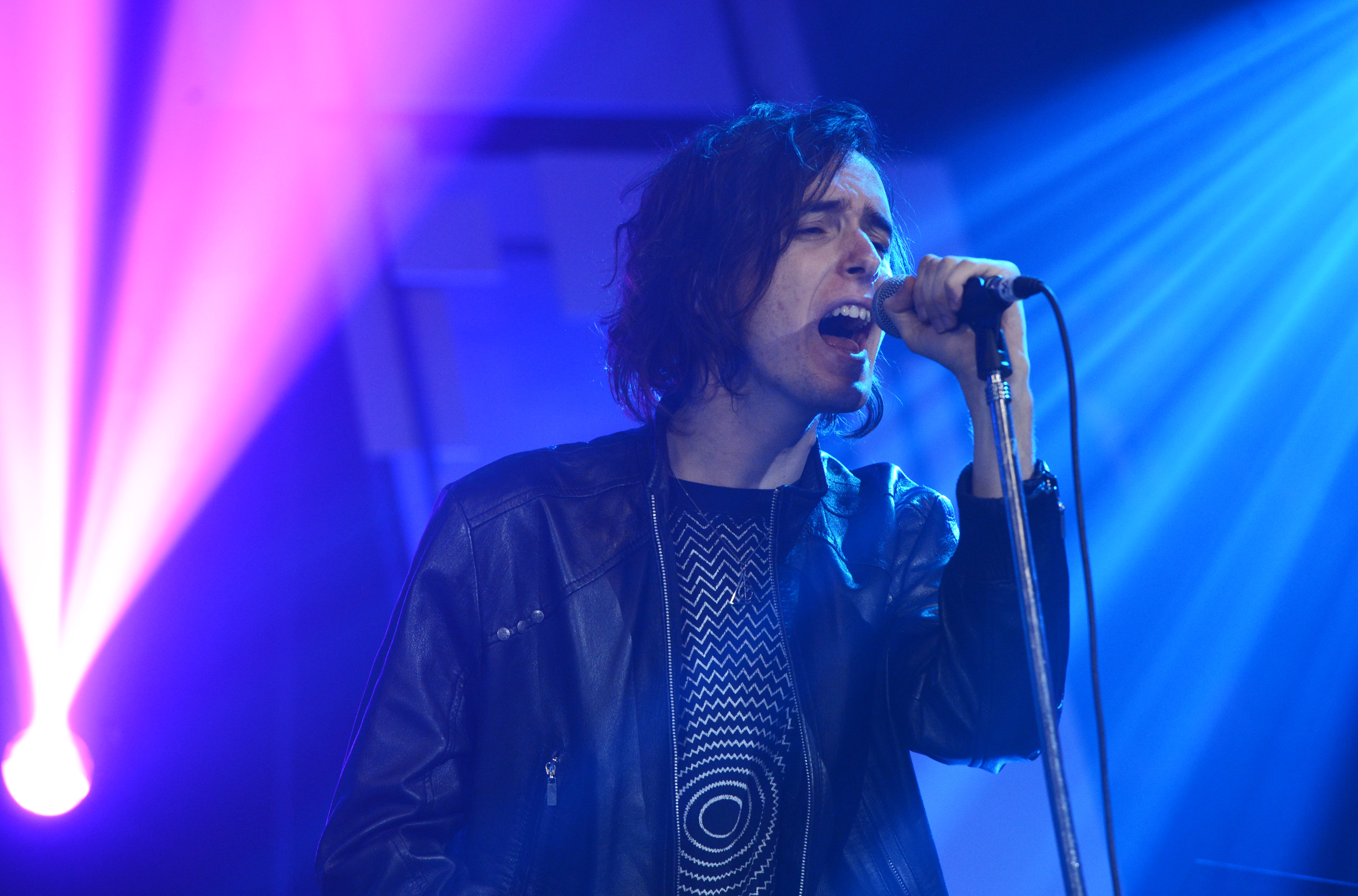 Benito Cerati en el homenaje a Gustavo Cerati en el programa Siempre es Hoy.